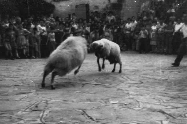 Force basque, combat de béliers à Zubieta (Navarre).